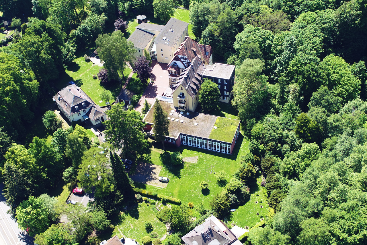 Die CVJM-Hochschule in Kassel im Stadtteil Wilhelmshöhe aus der Luft.